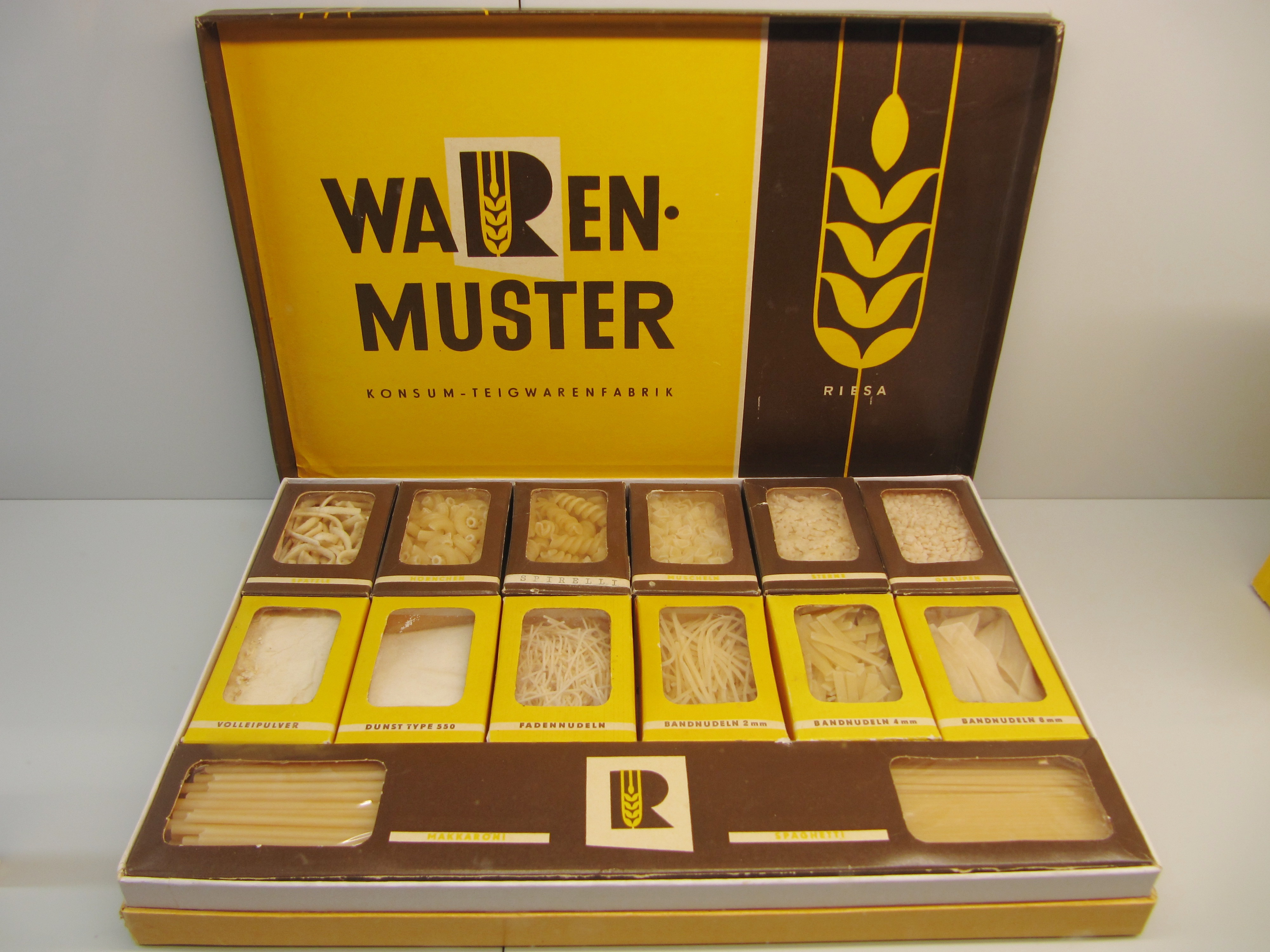 Warenmuster der Konsum-Teigwarenfabrik Riesa im Nudelmuseum, v. l. o. n. r. u.: Spätzle, Hörnchen, Spirelli, Muscheln, Sterne, Graupen, Volleipulver, Dunst Type 550, Fadennudeln, Bandnudeln 2 mm, Bandnudeln 4 mm, Bandnudeln 8 mm, Makkaroni, Spaghetti.